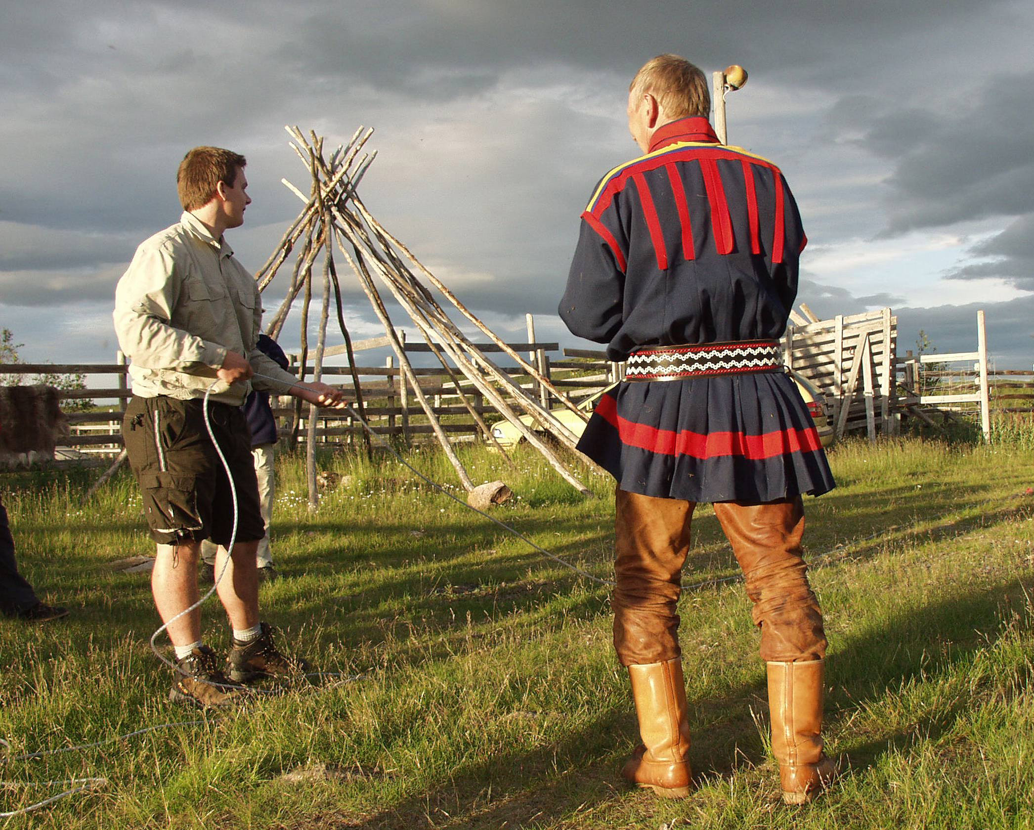 Nils Anders, ein Saami aus Kiruna (S), erklärt das Lassowerfen